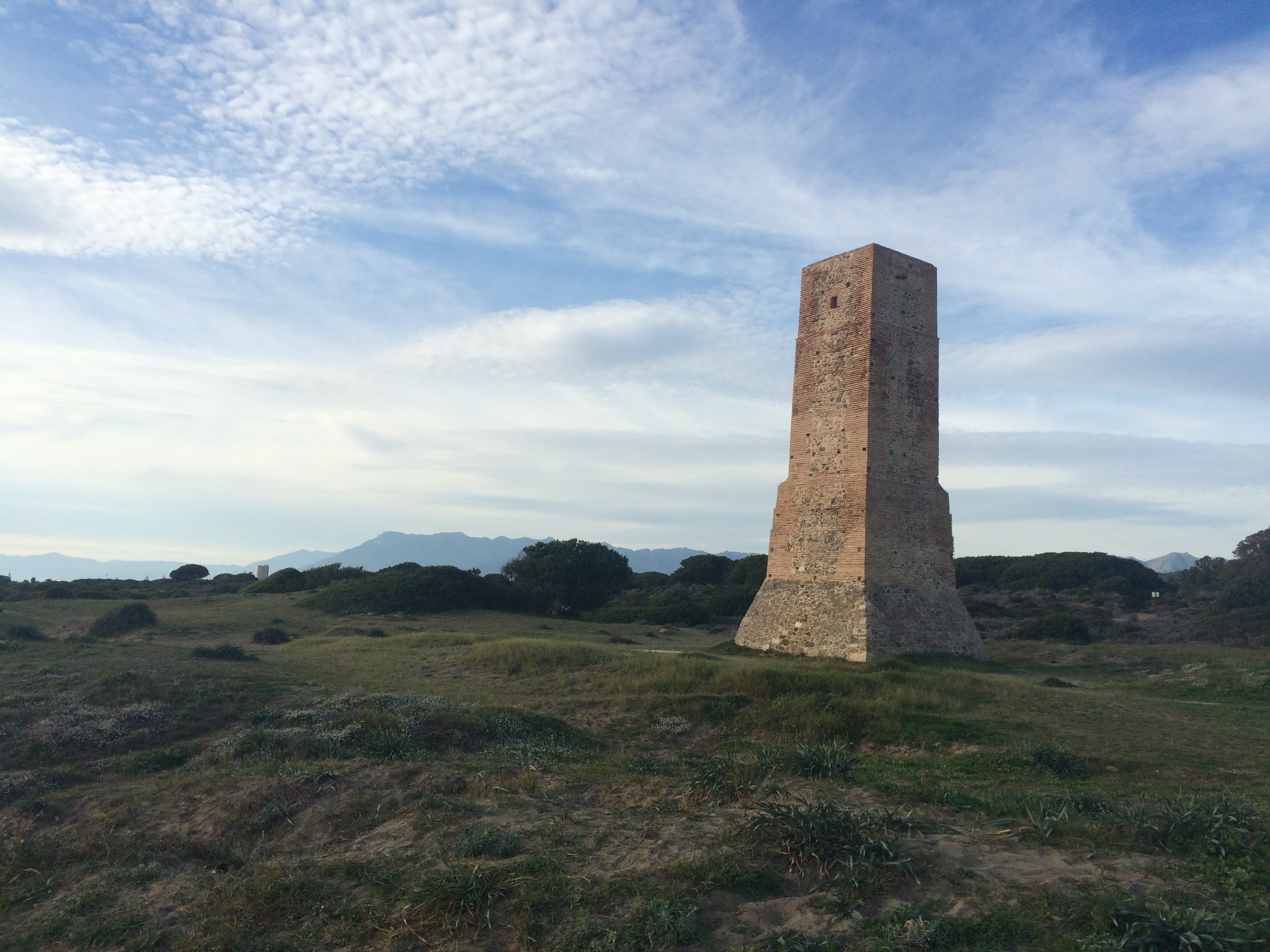 Torre Ladrones